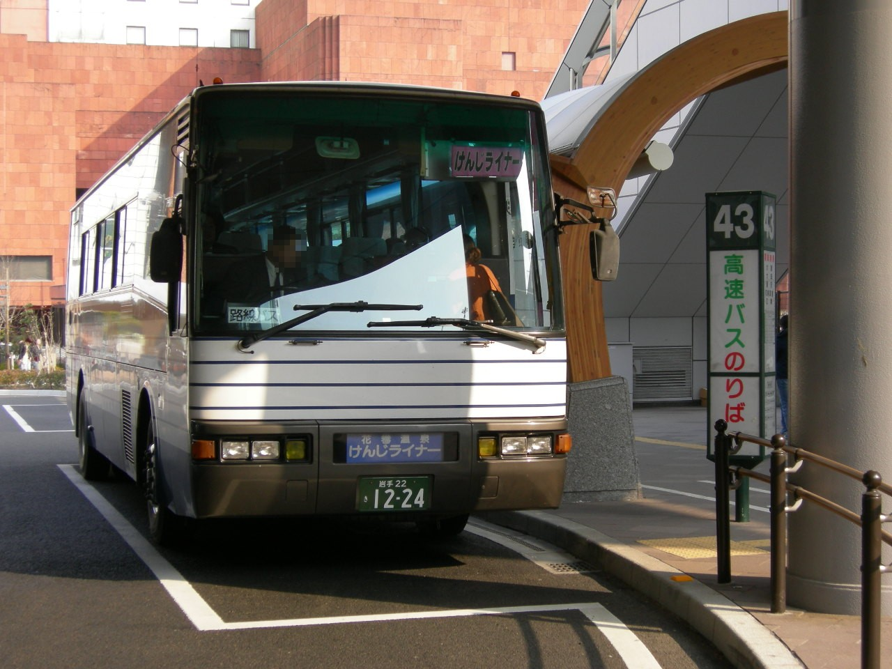 早池峰バス（当時）いすゞスーパークルーザー（Hayachine bus）登録番号：岩手22き12-24